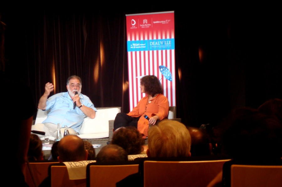 Festival du film américain de Deauville 2011 - Rencontre avec Francis Ford Coppola.